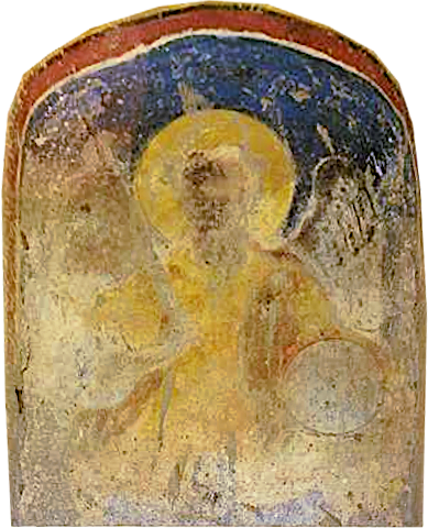 Надвходният стенопис от църквата „Свети Никола“ в демирхисарското село Загориче, Република Македония